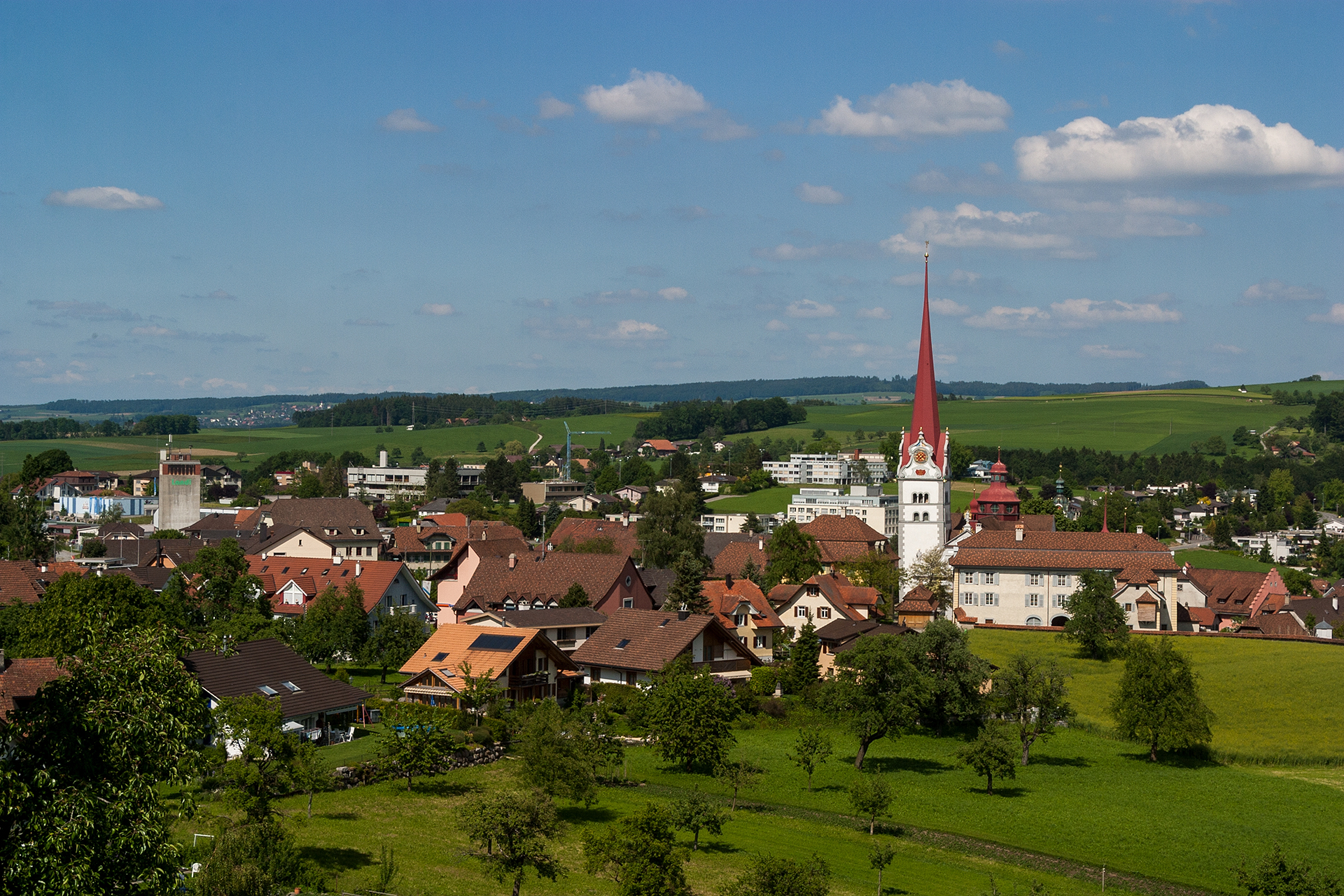 Beromünster